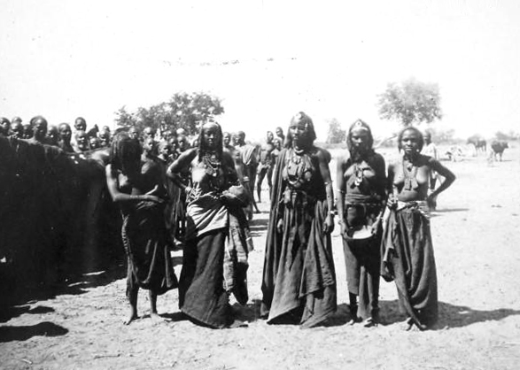 Tchad : Melfi. Femmes foulbés, 1925.